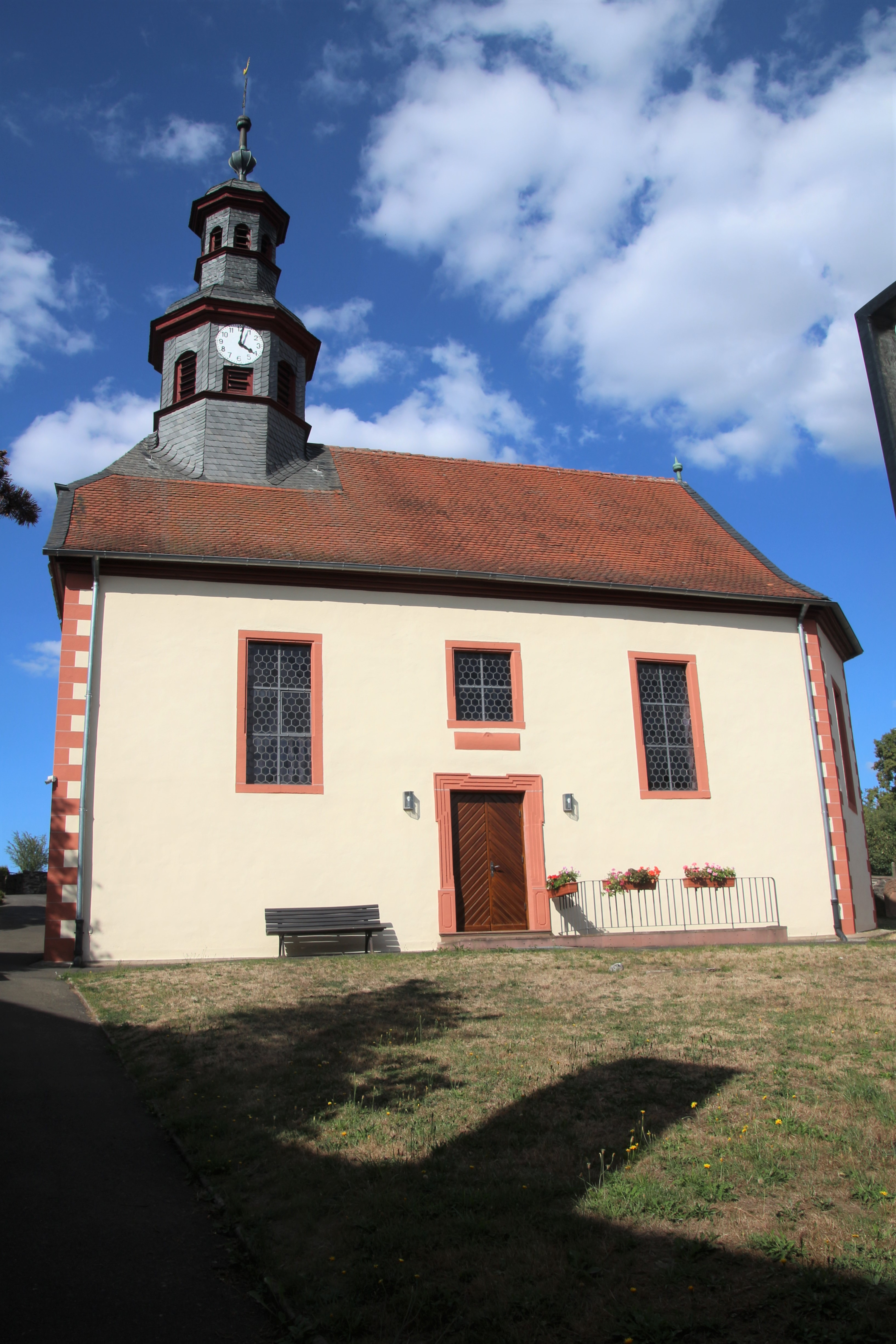 Evangelische Kirche Wallernhausen, Gemeinde Nidda, Wetteraukreis, Hessen